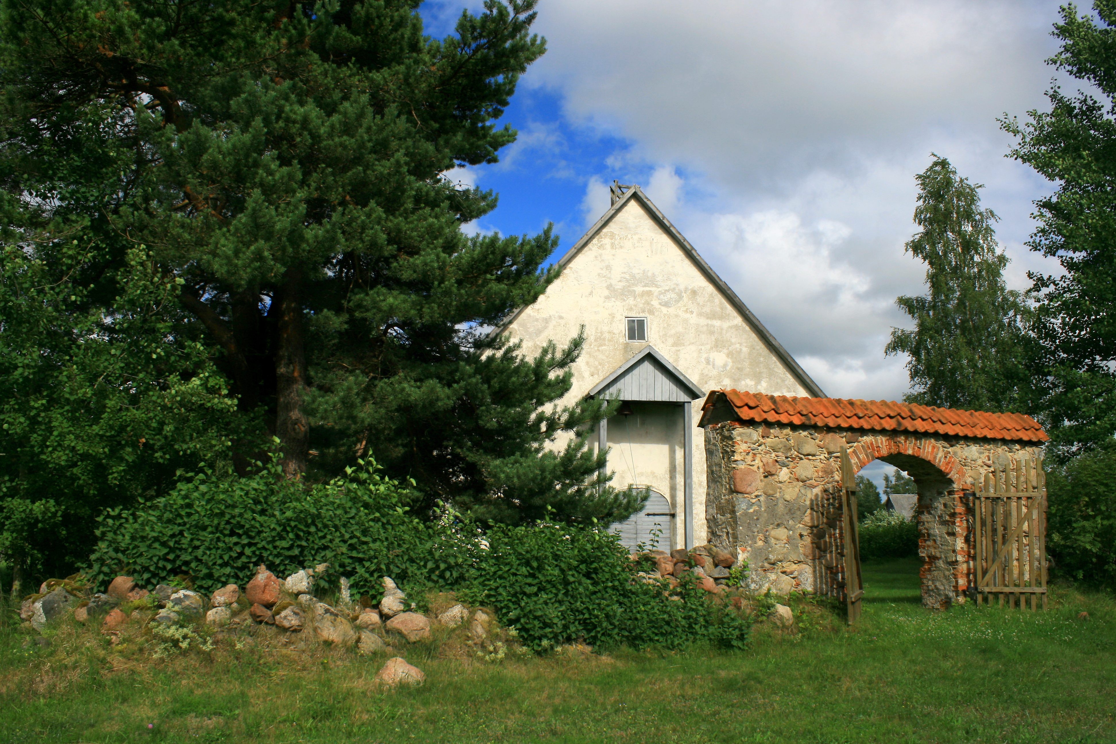 Ziemupe church